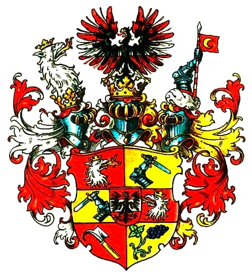 Wappen Graf Oppersdorff, Freiherr von Aich und Friedstein, Herr zu Oberglogau, gespalten und 2x geteilt (6 Felder) und mit rotem Herzschild, darin silberner Balken, das Ganze belegt mit schwarzem Adler, 1 und 4 in Rot feuerspeiender Kopf eines einwärts gekehrten silbenen Greifen (StW), 2 und 3 in Gold ein geharnischter Schwertarm, 5 in Rot ein schräg gestelltes goldenbegrifftes Rebmesser, 6 in Gold eine schräglinks liegende Rebe blauer Weintrauben (Stadt Oberglogau). 3 Helme: rechts mit r.-s. Decken der Greifenkopf samt Hals, auf dem mittleren mit rechts r.-s., links r.-g. Decken der Adler vor einem mit silbernem Balken belegten offenen roten Flug, links mit r.-g. Decken ein aus rotem Turban mit silbernem Wulst wachsender geharnischter Arm, der eine mit goldenem Halbmond belegte Tükenfahne emporhält.